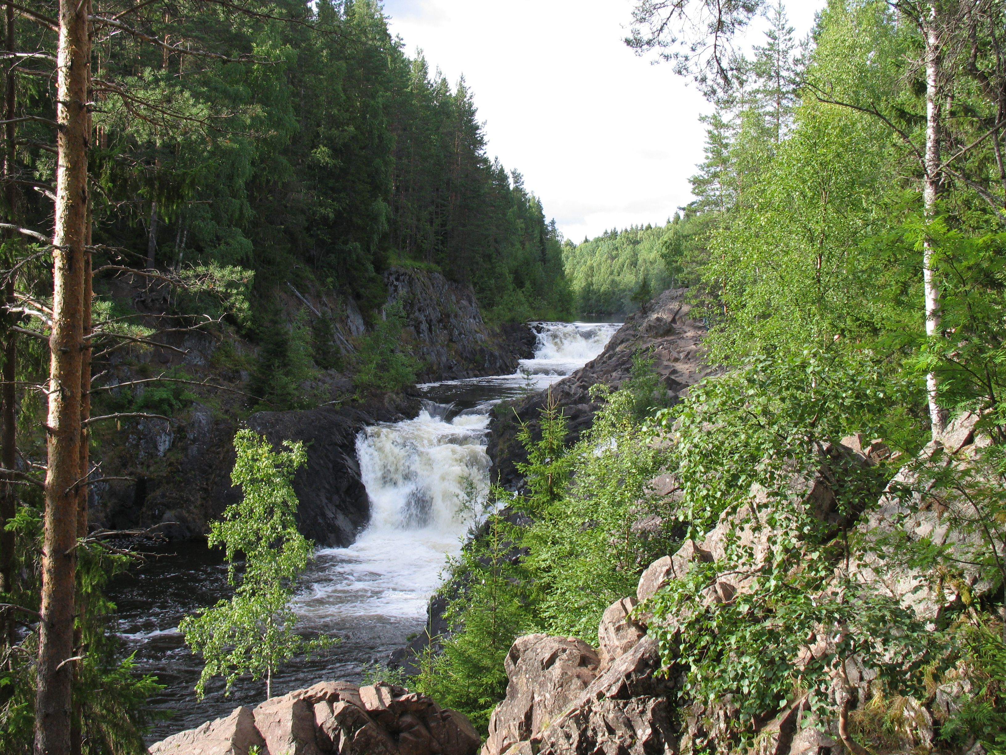 Водопад Кивач, Карелия. август 2008